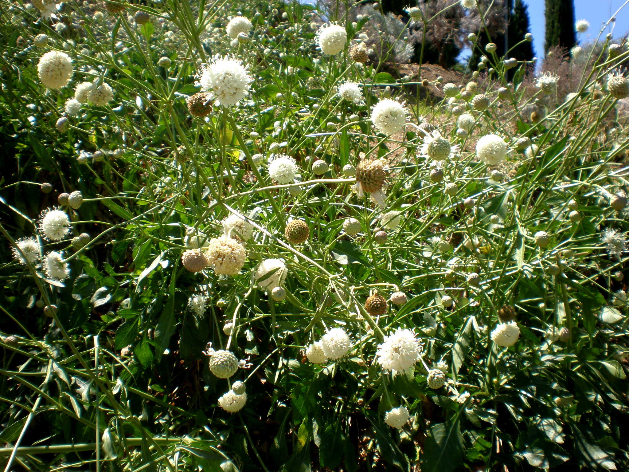 Jardín Botánico de Barcelona.